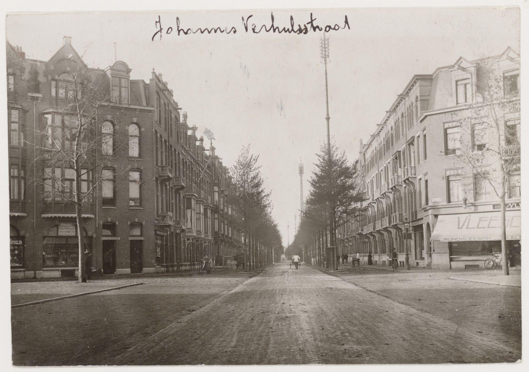 Johannes Verhulststraat ter hoogte van de Jacob Obrechtstraat met links nr. 33 en rechts nr. 32. Amsterdam, Stadsarchief (inv.nr. 010003004139).